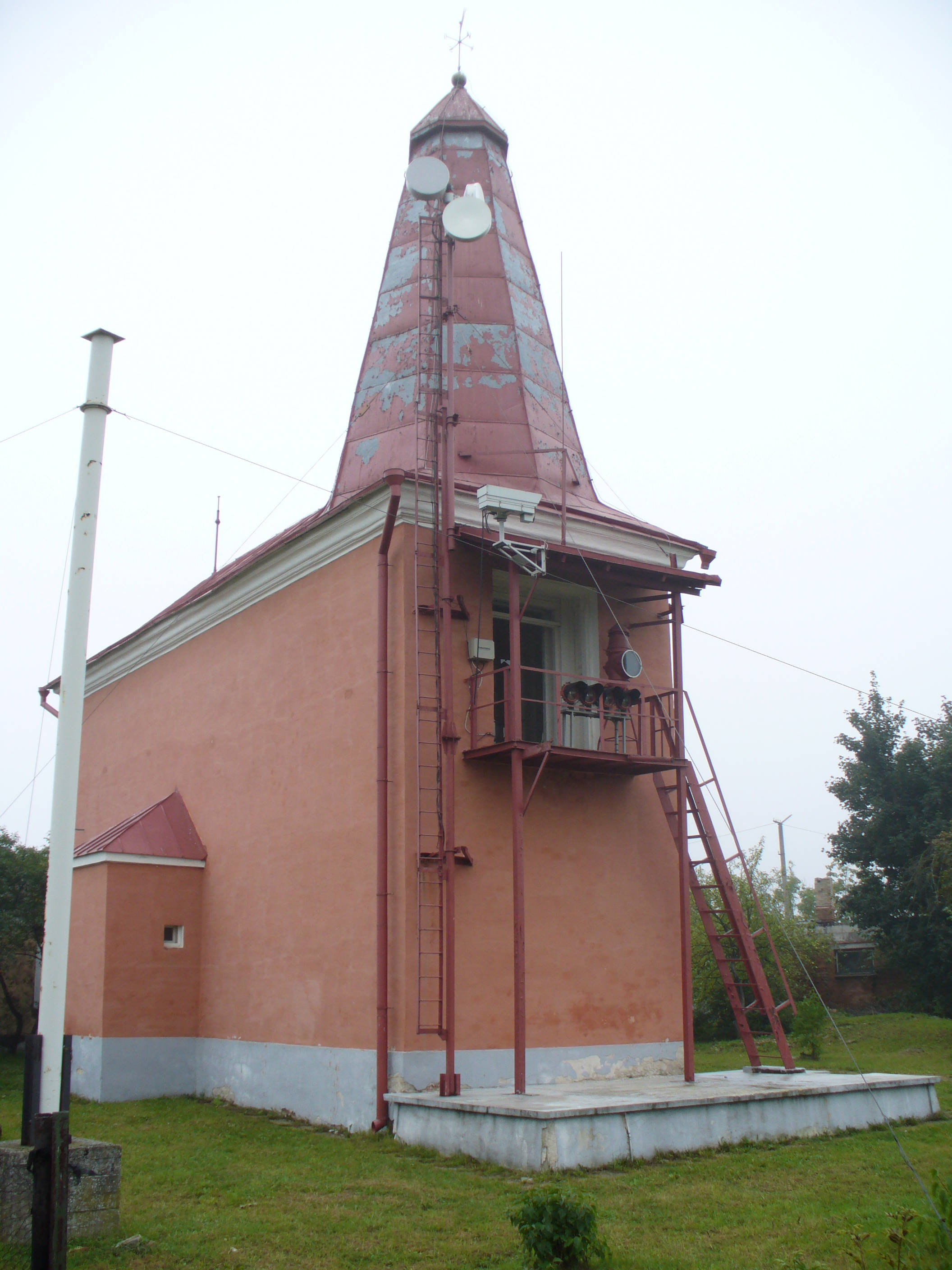 Tallinna liitsihi alumine tuletorn